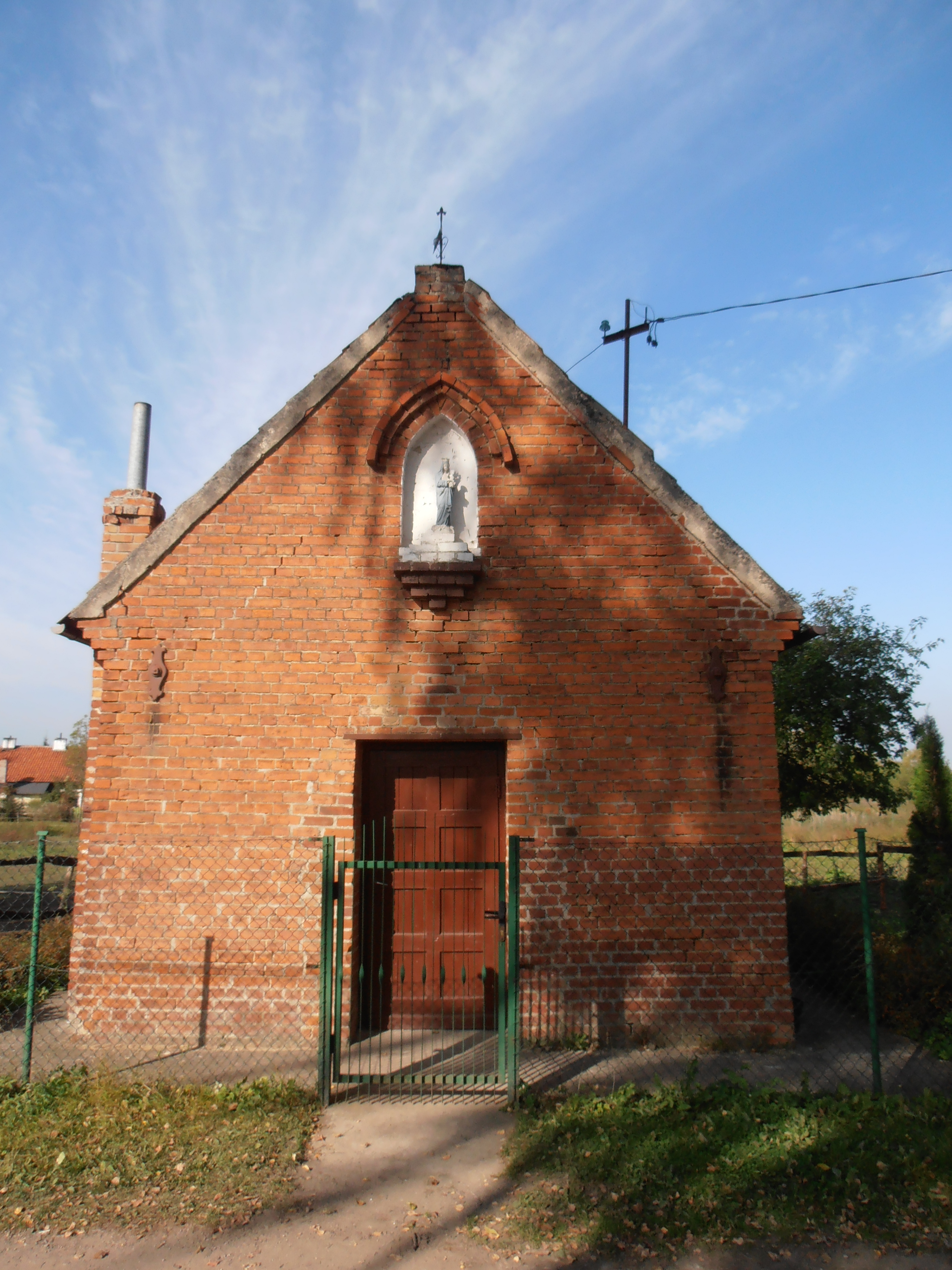 Kapliczka we wsi Linowo